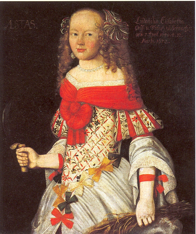 Portrait of Ludmilla Elisabeth von Schwarzburg-Rudolstadt (1640-1672)